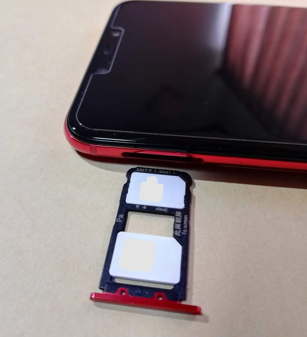 SIMピンでスロットを取り出してセットするタイプのデュアルSIMスロット。